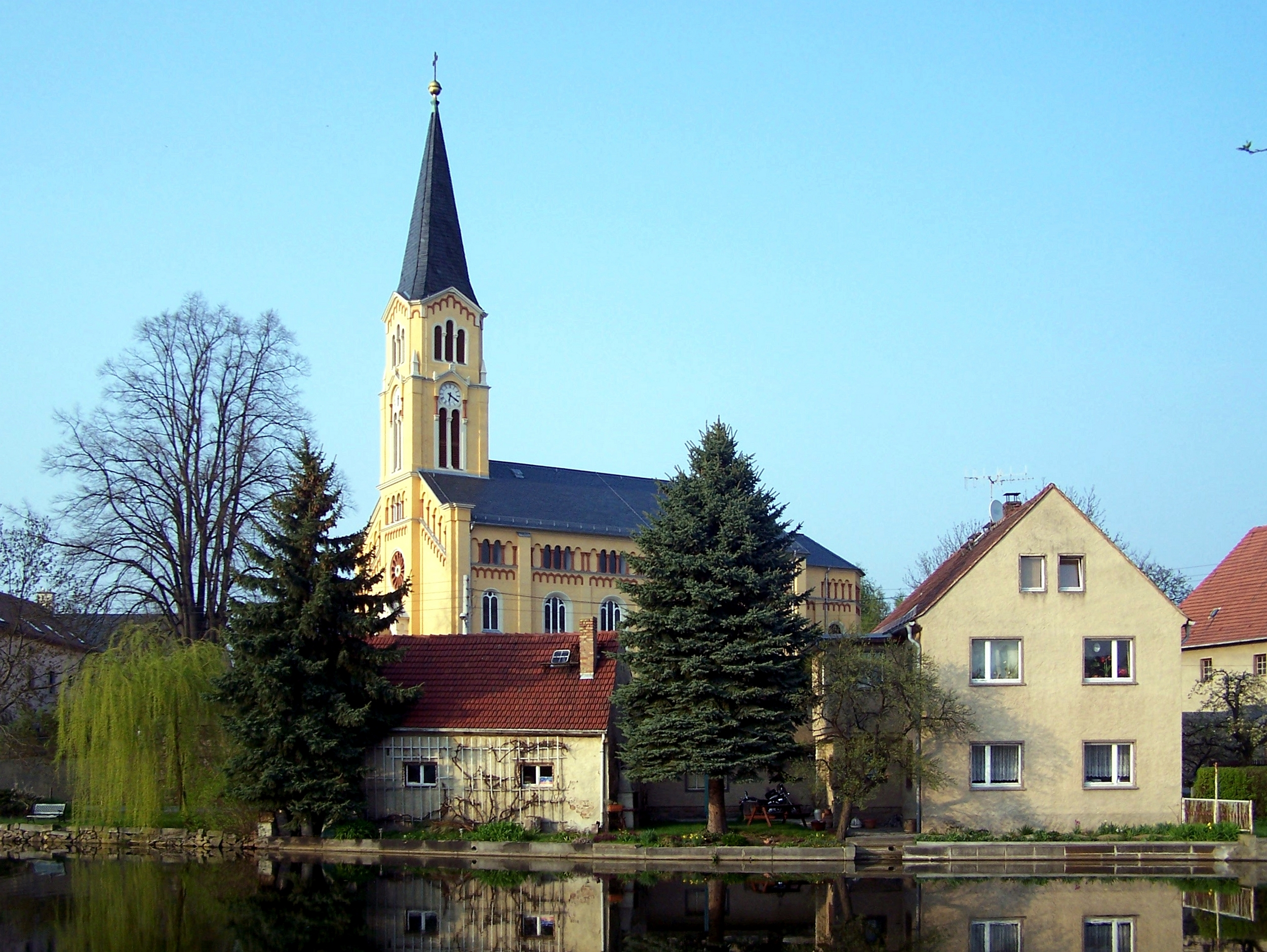 Kirche zu Bärnsdorf, Gemeinde Radeburg, Landkreis Meißen